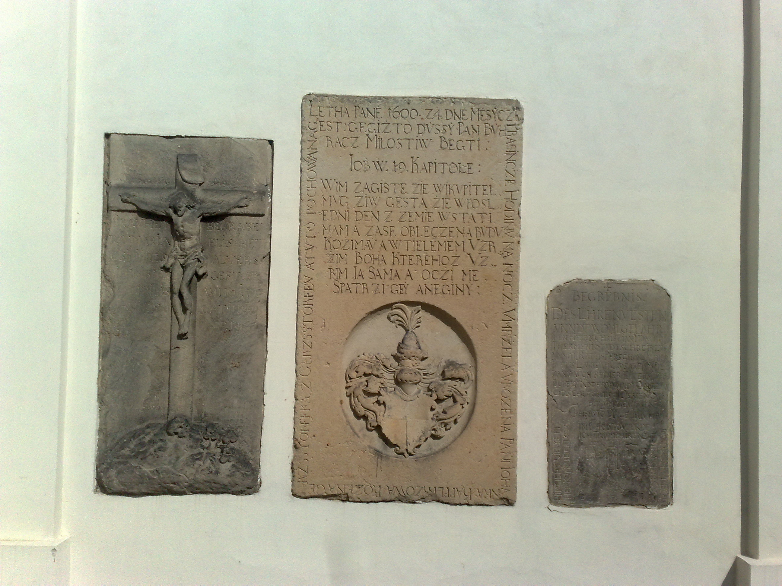 Desky poblíž kostela (Děkanský kostel sv. Jana Křtitele)